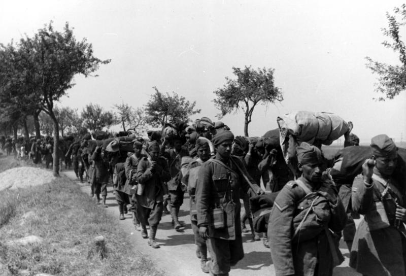 Marsch in deutsche Gefangenschaft